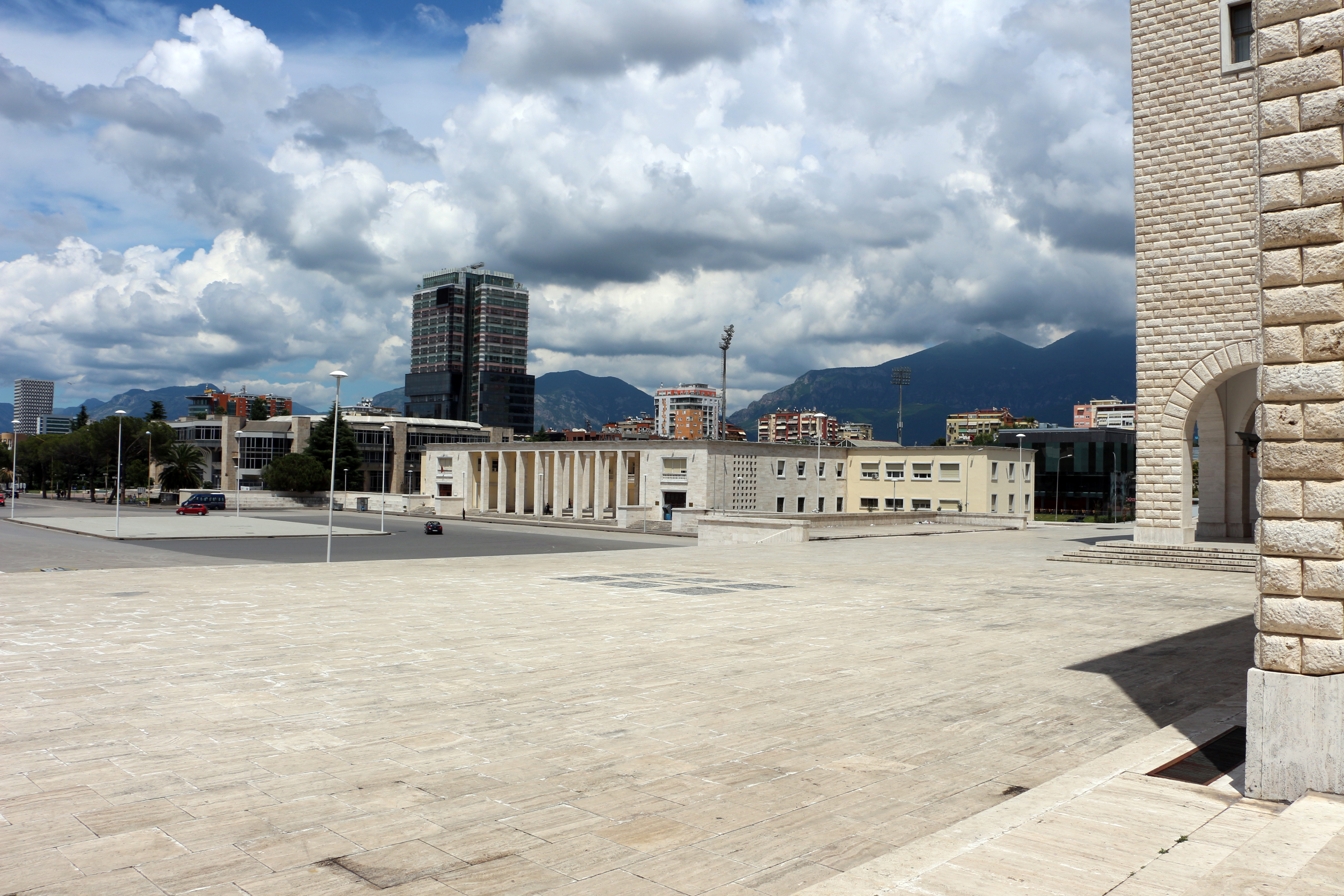 Muzeu Arkeologjik